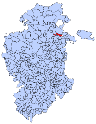 Situación de Partido de la Sierra en Tobalina en el mapa de Burgos.